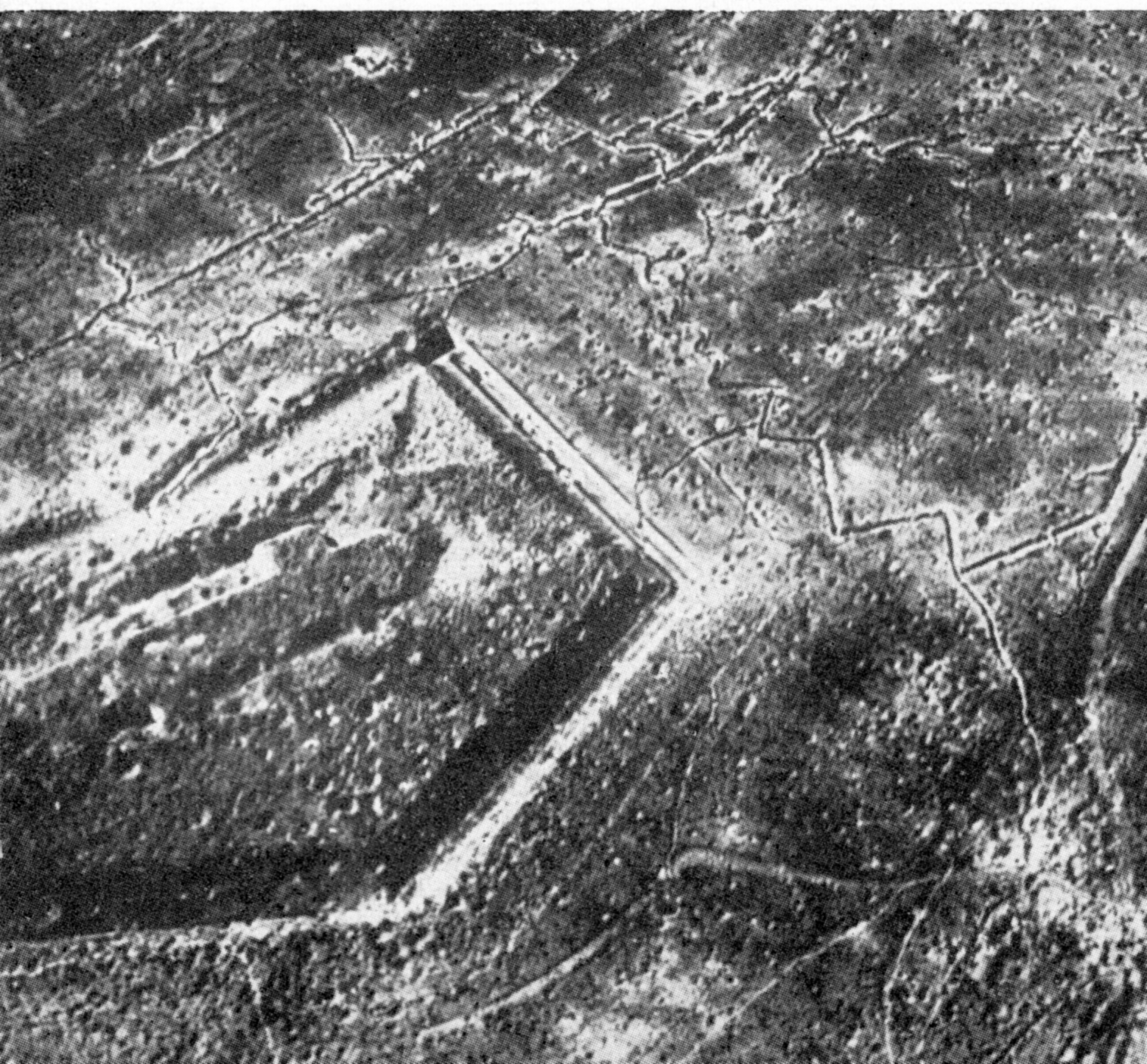 Fort Douaumont Ende 1916